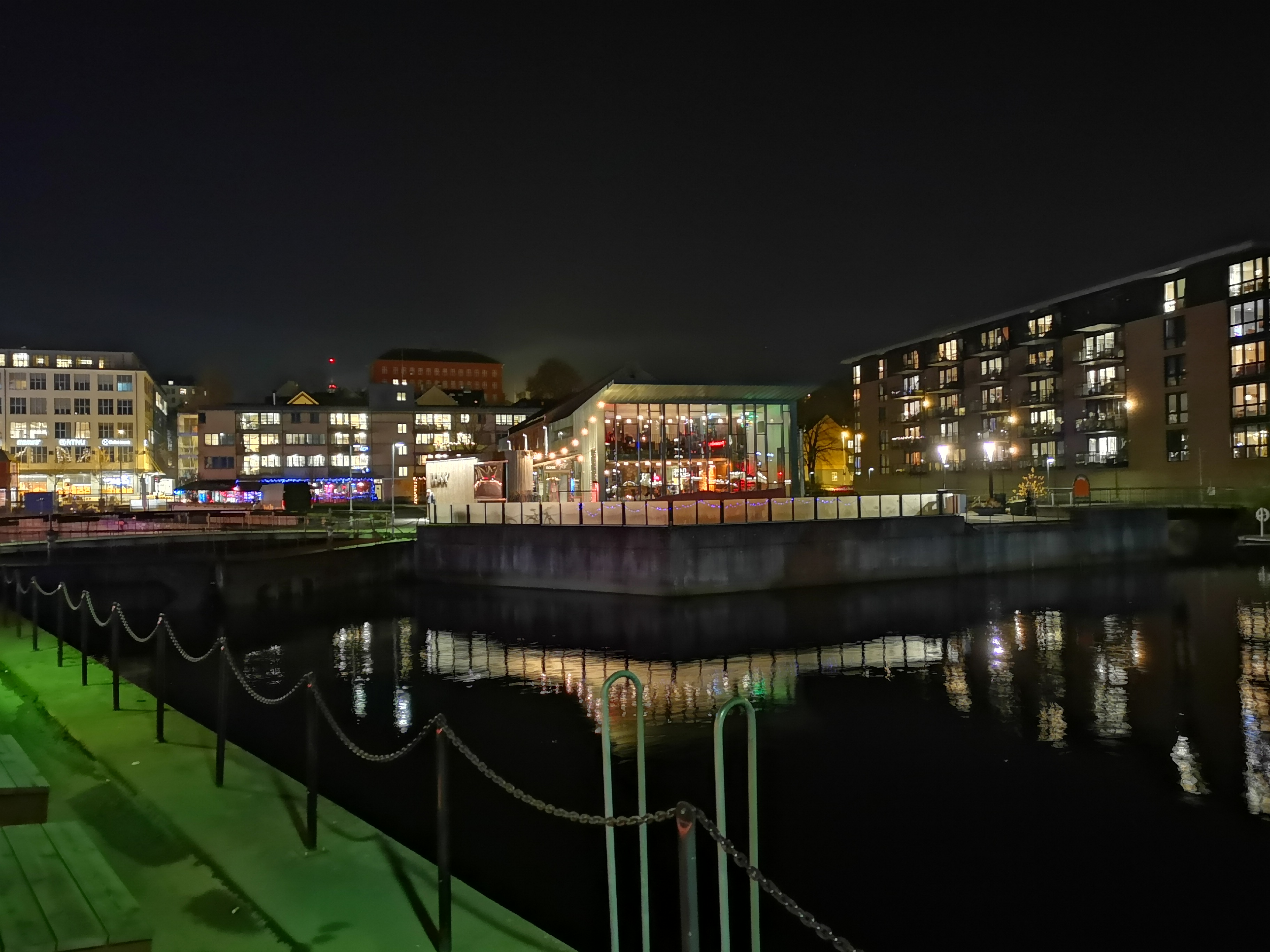 Dokkhuset scene i Trondheim fra Solsiden